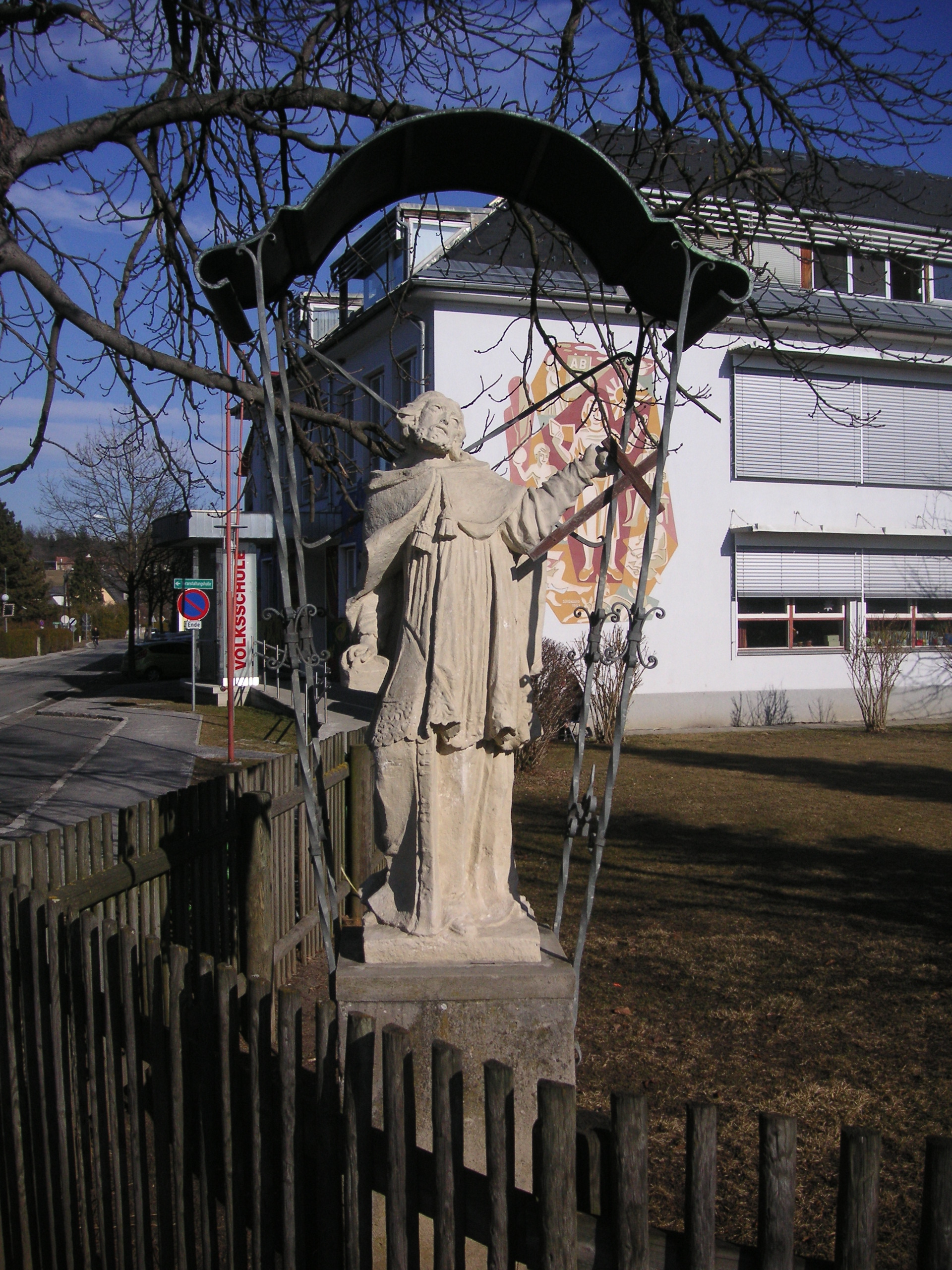 Figurenbildstock hl. Johannes Nepomuk in Lieboch